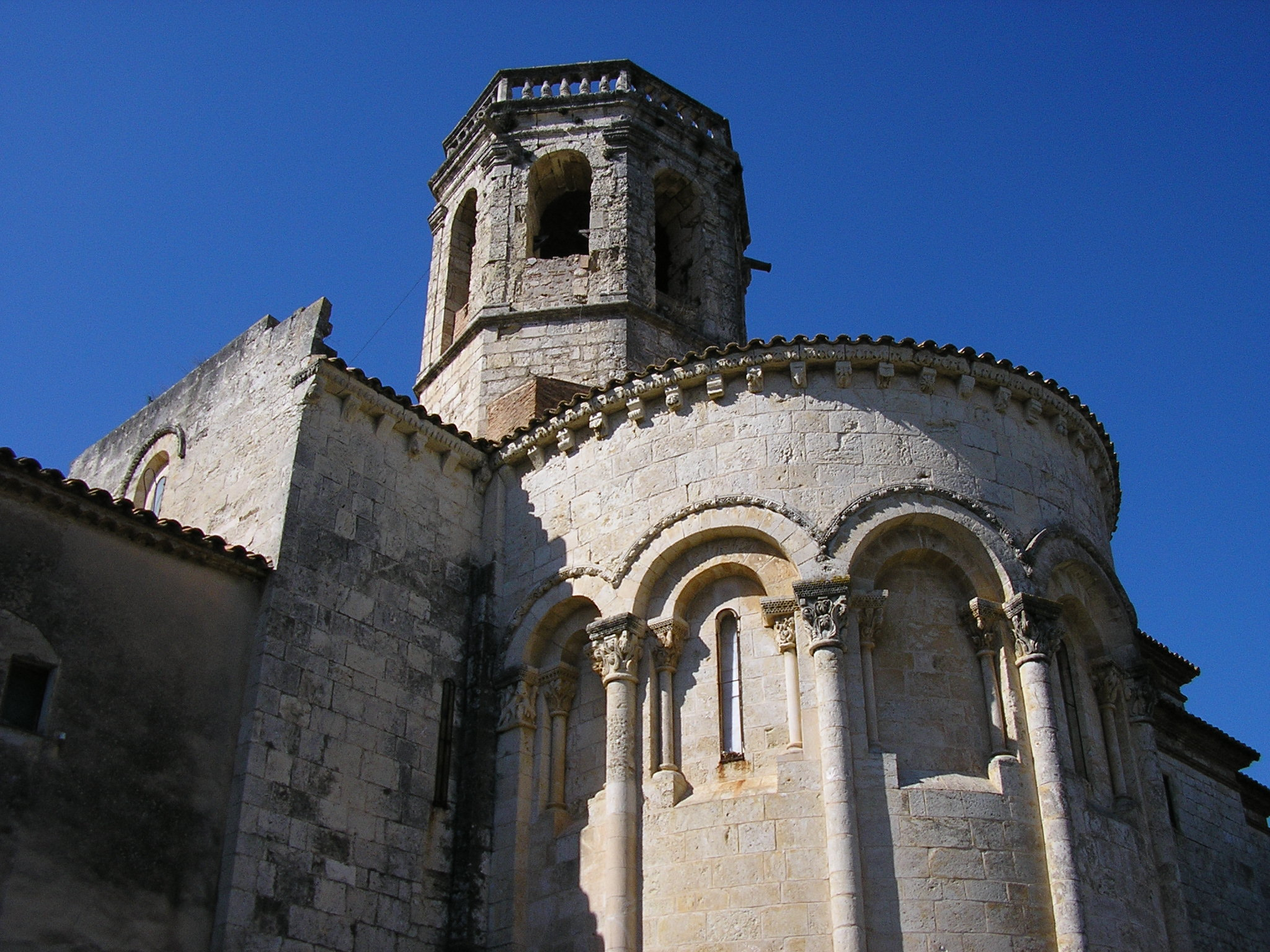 Sant Marti Sarroca - Iglesia de Santa Maria (Abside 2)